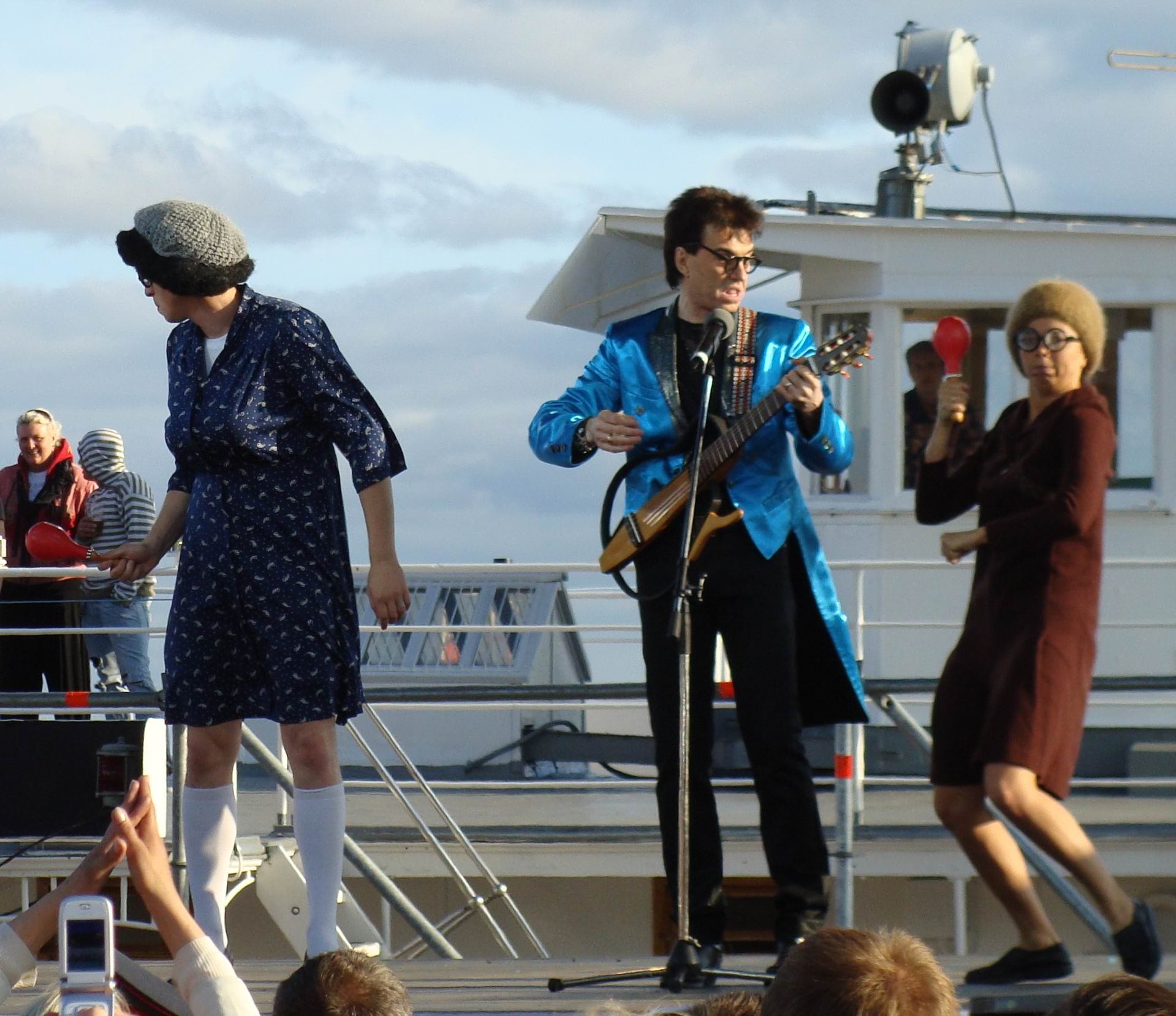 Ветров Геннадий Анатольевич в Архангельске выступает совместно с программой Регины Дубовицкой - "Аншлаг" на юбилее, 425-летии города, в воскресенье, летом 28 июня 2009 года.